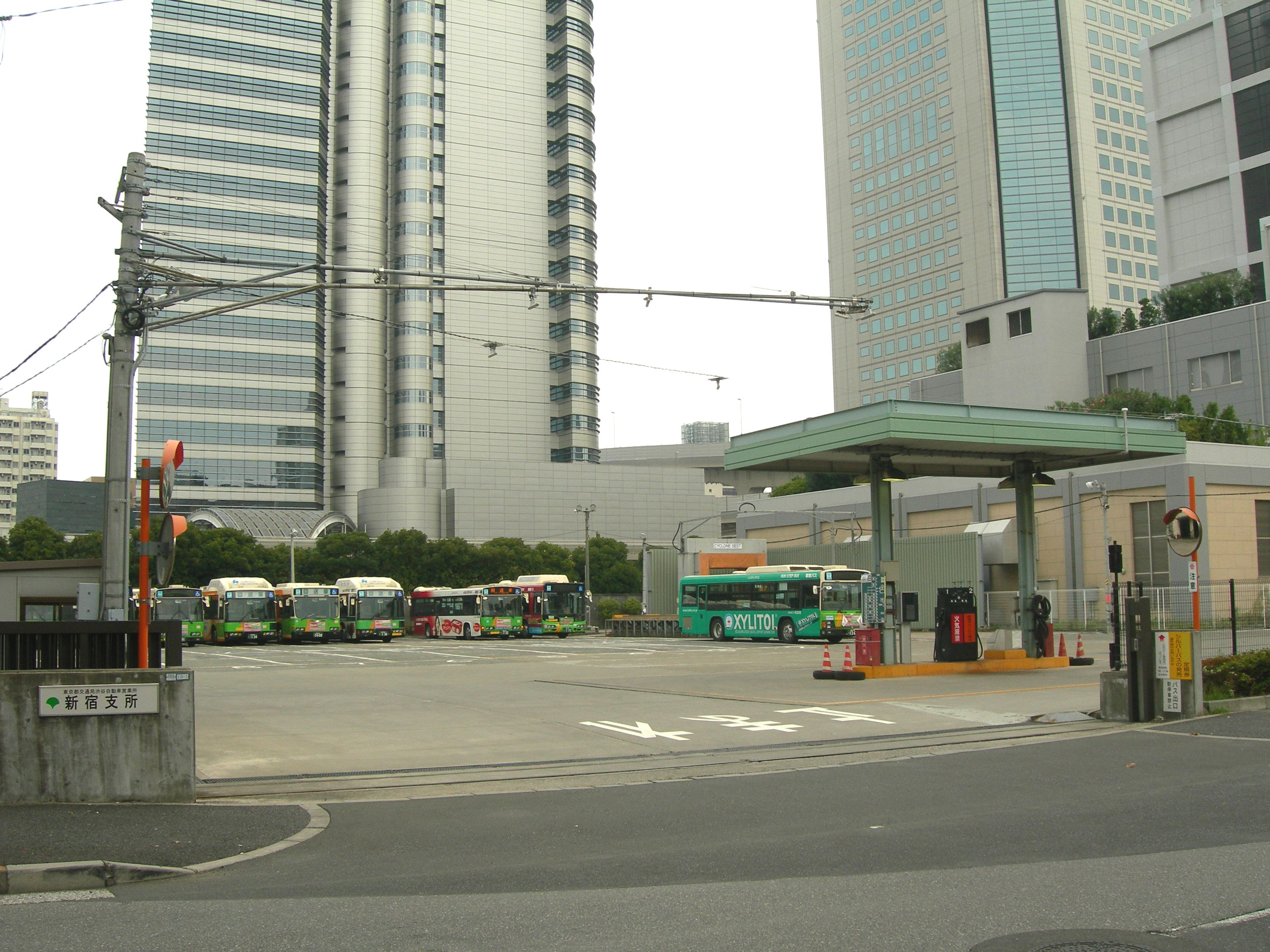 東京都交通局渋谷自動車営業所新宿支所